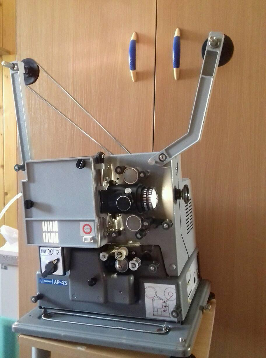 Projektor AP-43